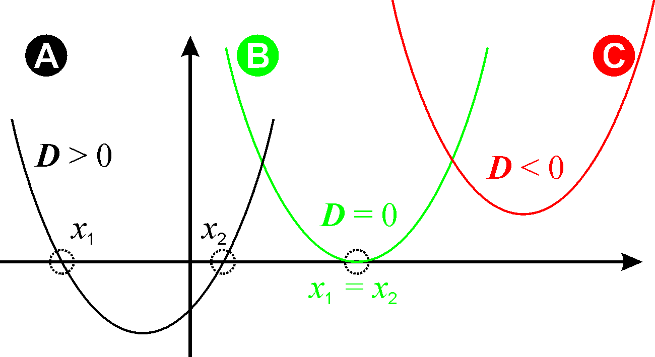 effect discriminant op aantal wortels